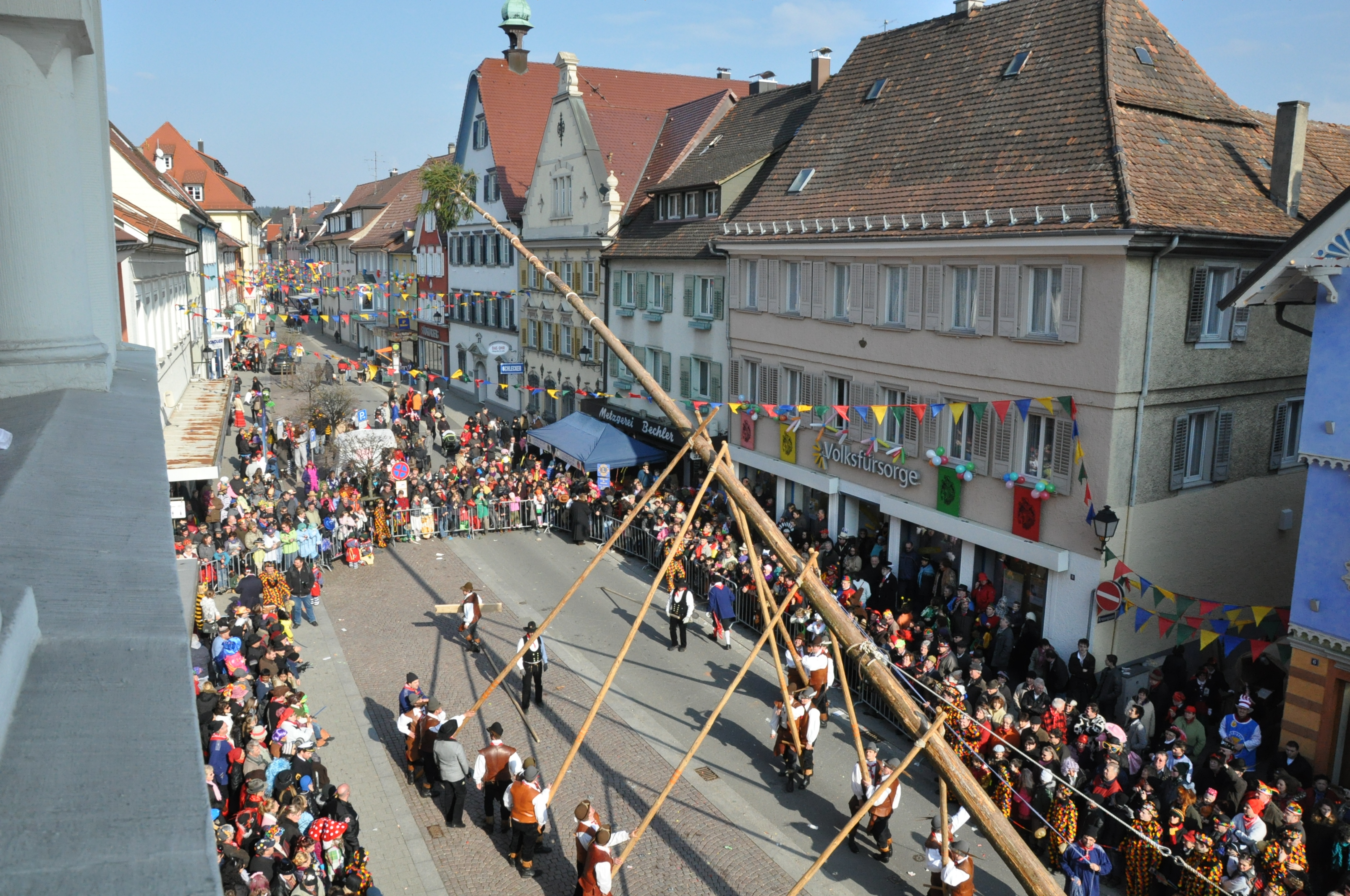 Schmotziger Dunschtig in Stockach / Narrebaumsetzen